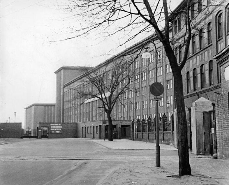 Berlin, Nalepastraße, Sendeanstalt Zentralbild Baier Ho. 29.4.1958 Berlin, Deutschlands Hauptstadt Ein Gebäudekomplex des Staatlichen Rundfunkkomitees in Oberschönweide, Napelastrasse